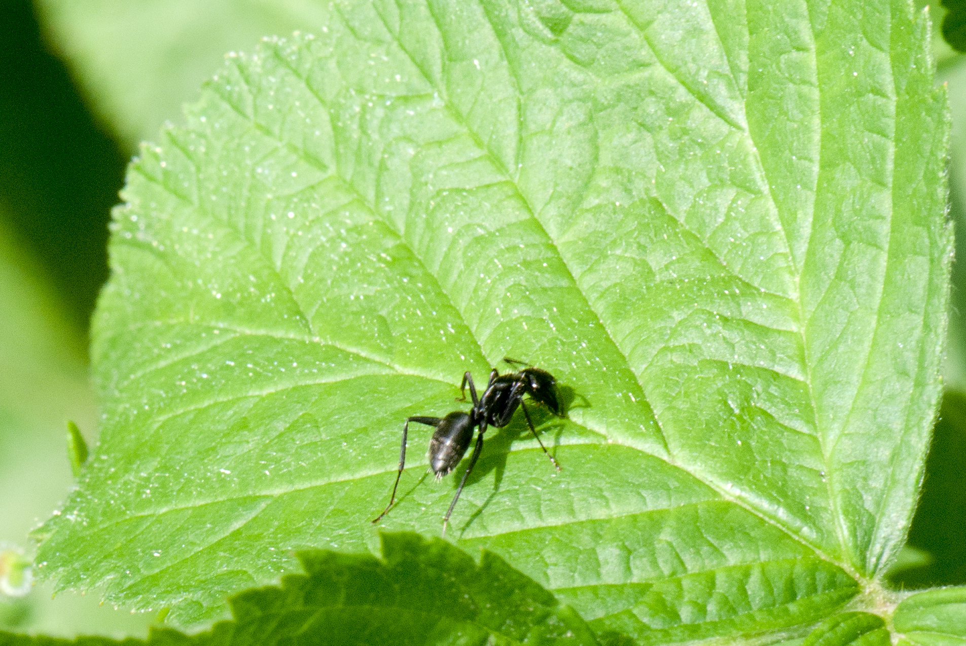 Sibiu, Romania, 2011